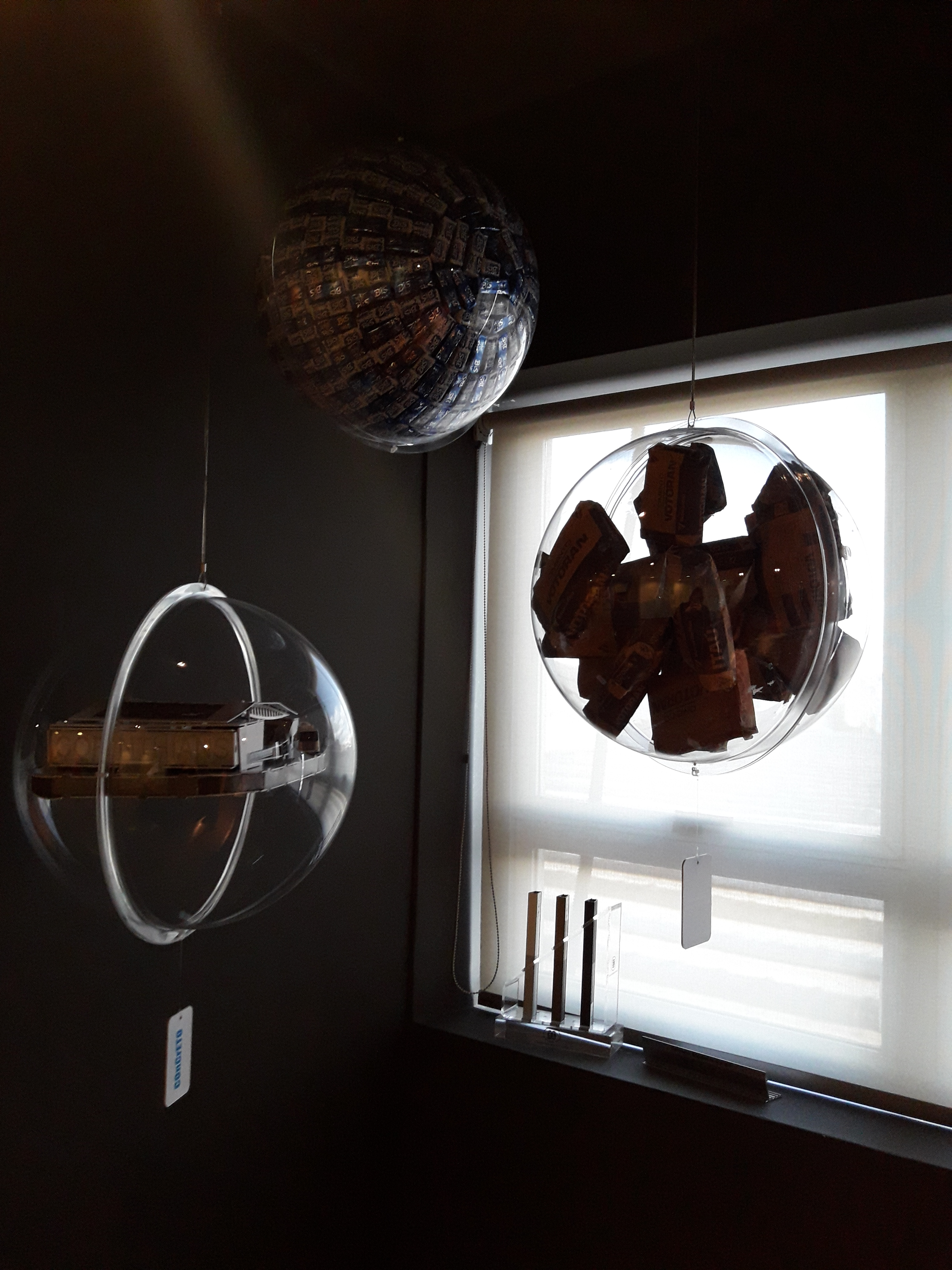 Algumas exposições do Espaço Votorantim